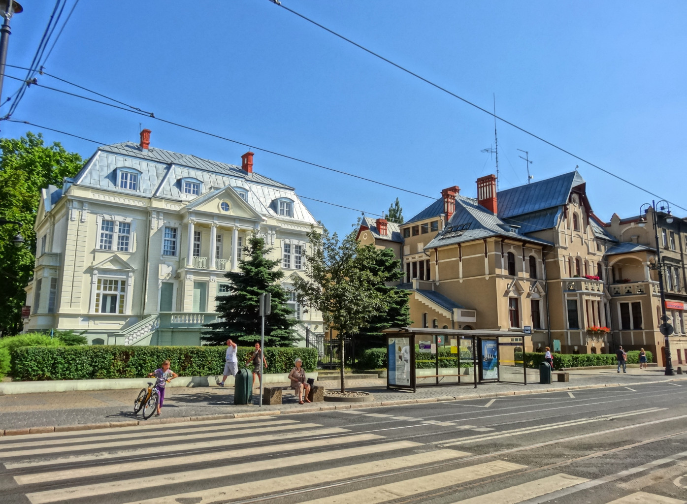 Ulica Gdańska w Bydgoszczy na odcinku między ul. Śniadeckich, a ul. Cieszkowskiego